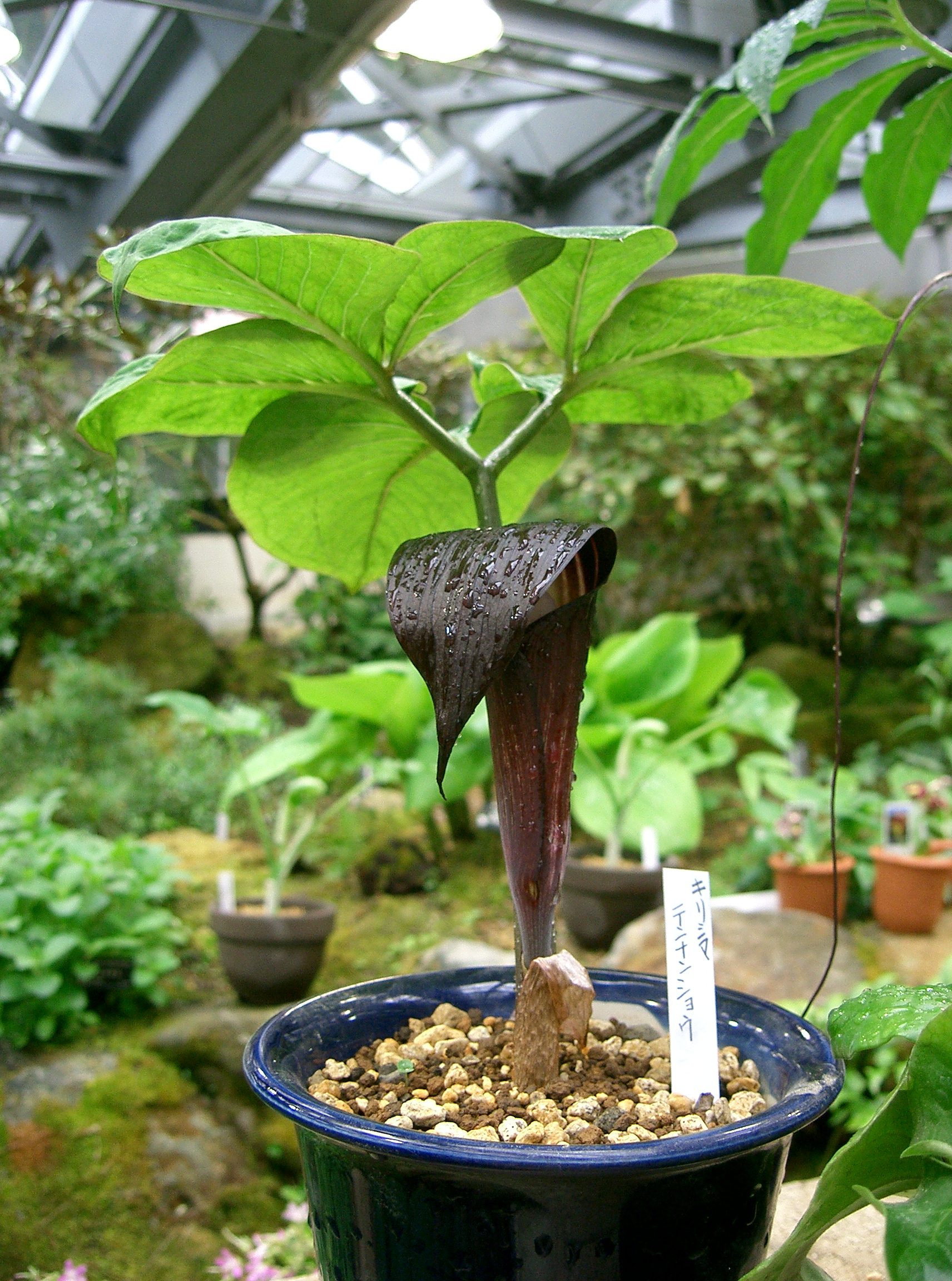 Scientific name Arisaema sazensoo